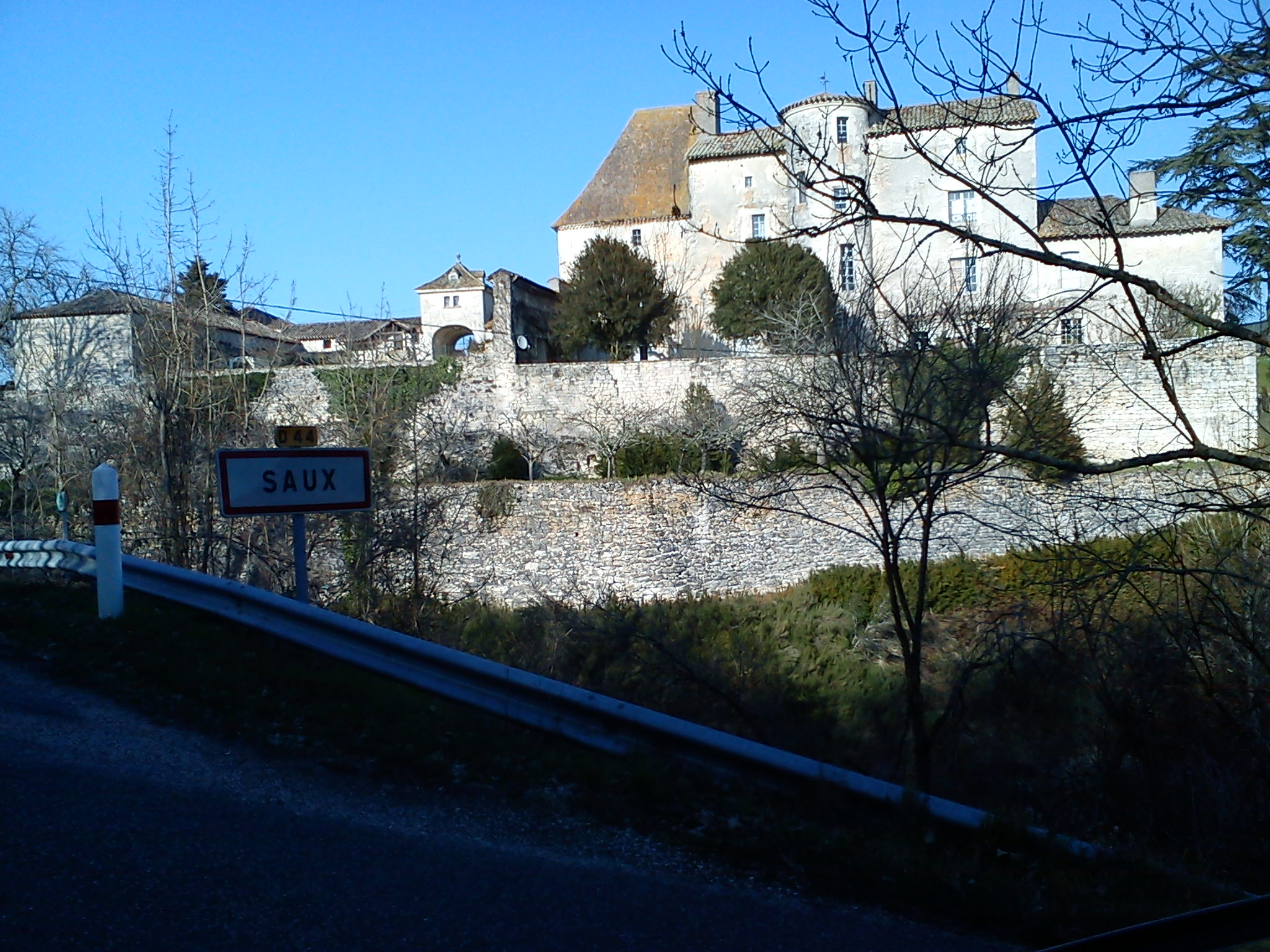 Château de Saux